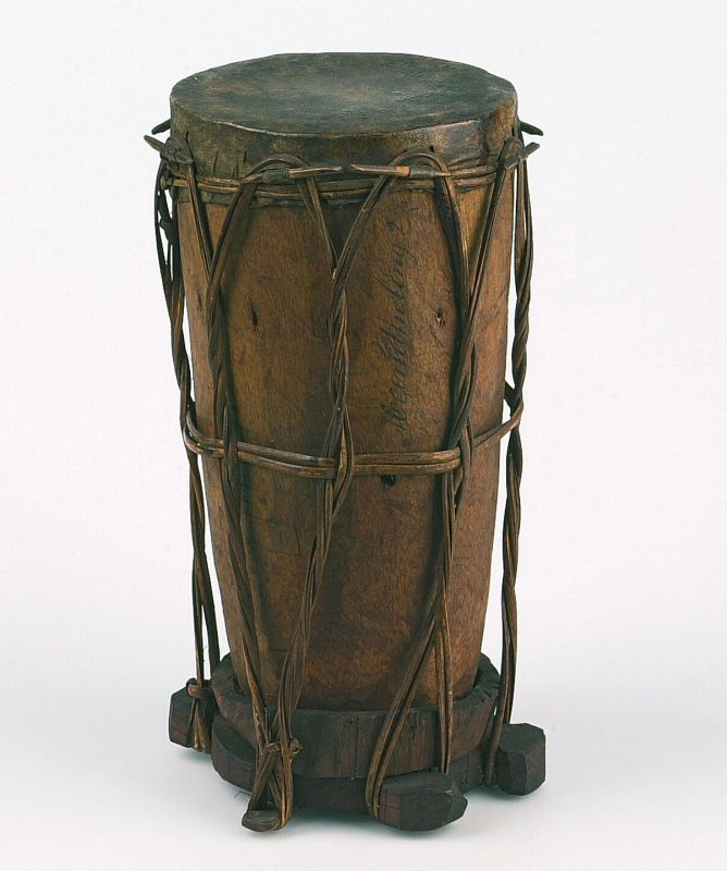 Slaginstrument. Enkelvellige tonvormige trom